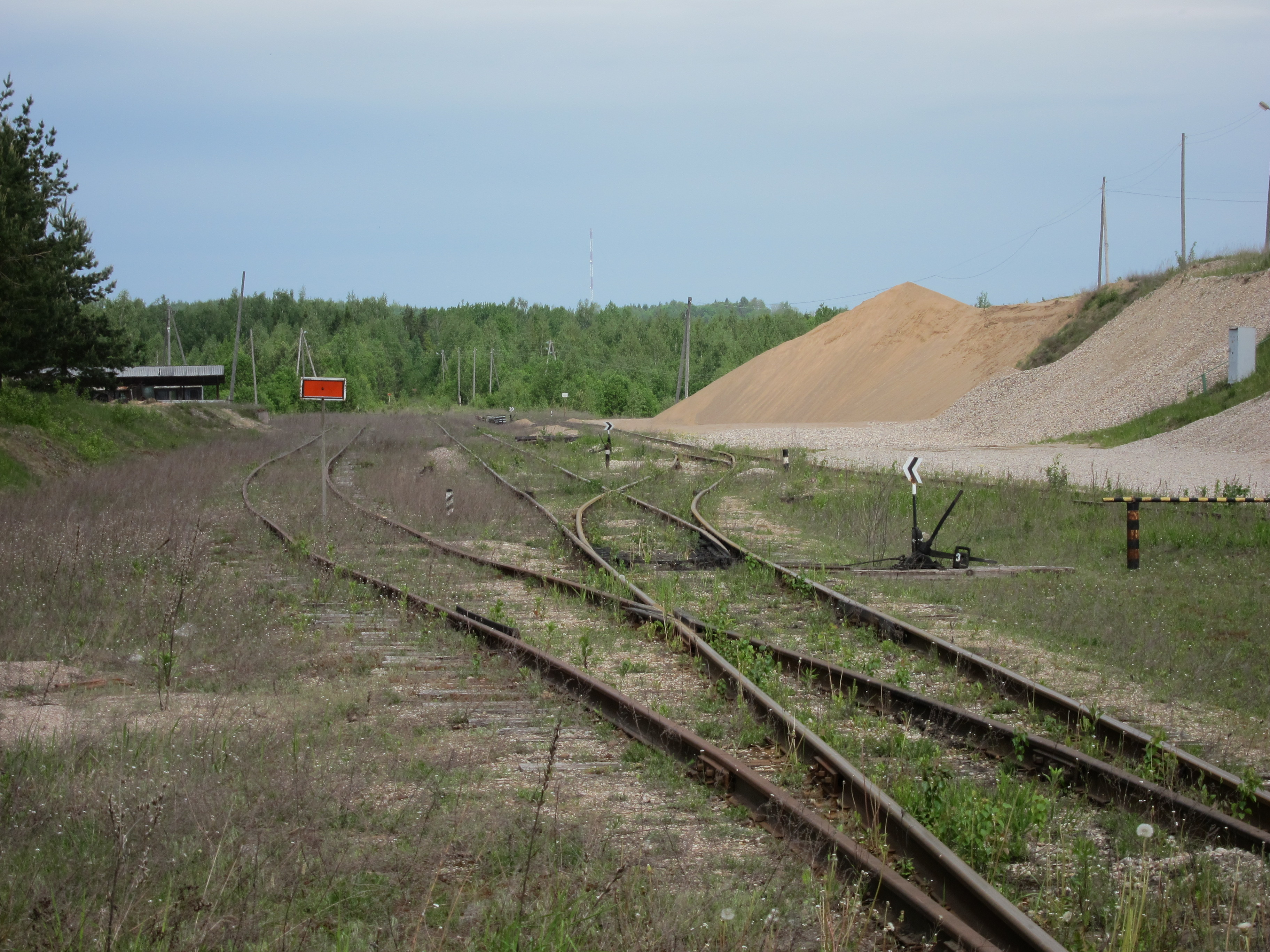 Jaunkalsnavas virziena sliežu izvērsums Vesetas stacijā.